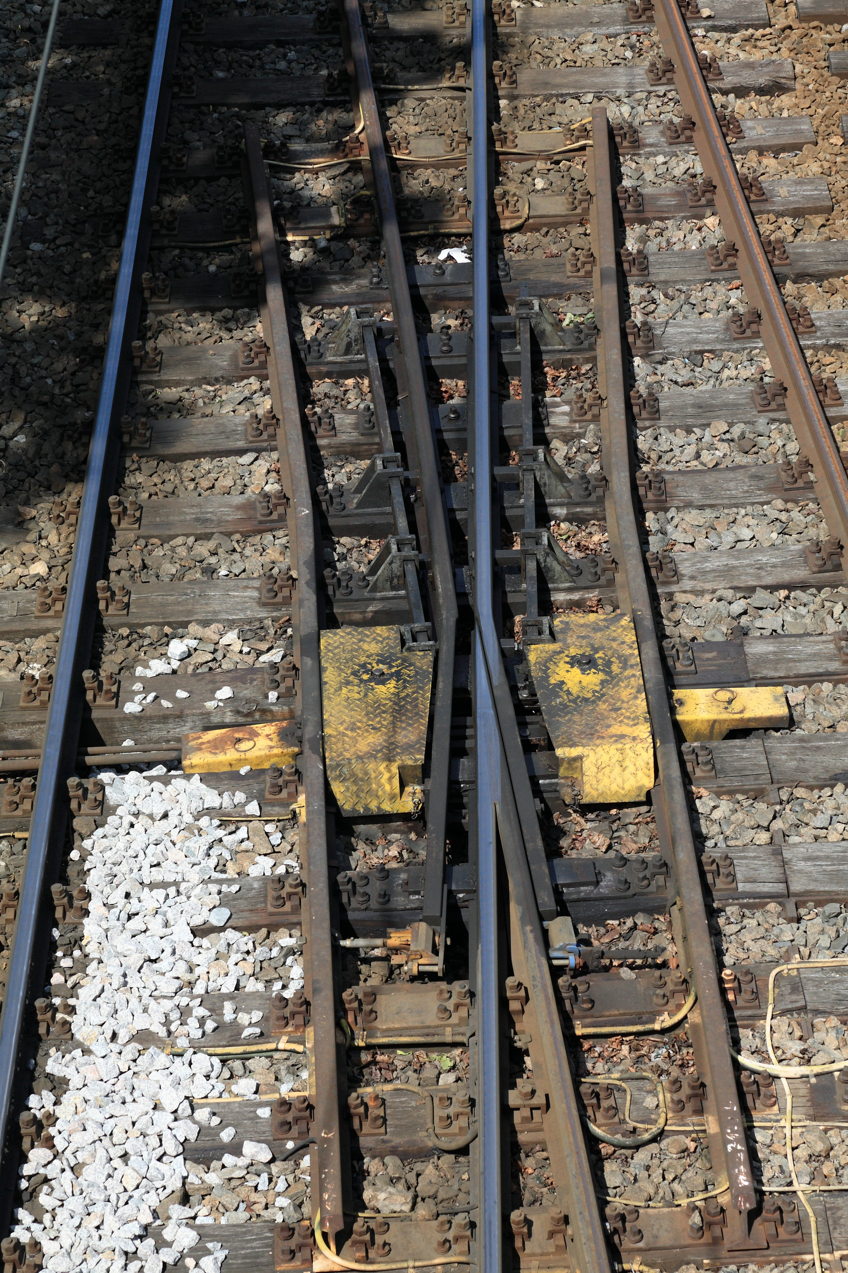 Die beweglichen Flügelschienen gewährleisten eine lückenlose Fahrkante und sind für den Mischbetrieb mit Fahrzeugen mit Straßen- und Eisenbahnfahrzeugen notwendig. Die beweglichen Flügelschienen werden mit Klammerverschlüssen an der Spitze verriegelt, die vom selben Antrieb bewegten seitlichen Schieber stützen die jeweils anliegende Flügelschiene auf jeder Schwelle. An den Enden der Flügelschienen sind Weichenschlösser für die behelfsmäßige Sicherung ständig angebracht.